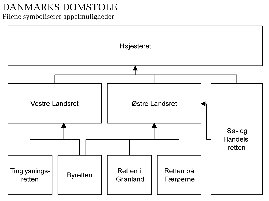 Diagram der viser appelmulighederne ved de danske domstole